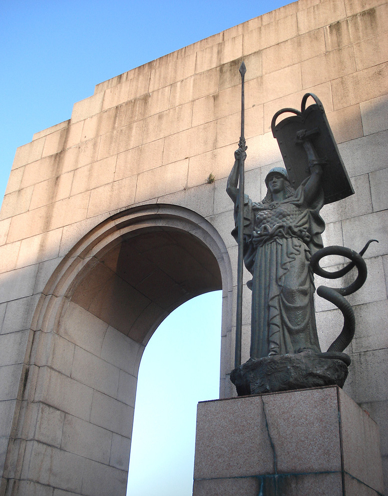 Estátua guerreira no Monumento ao Expedicionário, Porto Alegre, Brasil.